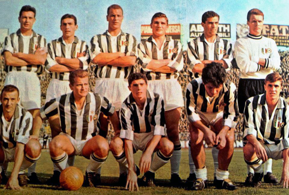 Una formazione della Juventus nella stagione 1960-61. Da sinistra, in piedi: U. Colombo, T. Burgnich, J. Charles, G. Leoncini, B. Nicolè, G. Vavassori; accosciati: S. Cervato, G. Boniperti (capitano), B. Mora, O. Sívori, B. Sarti.